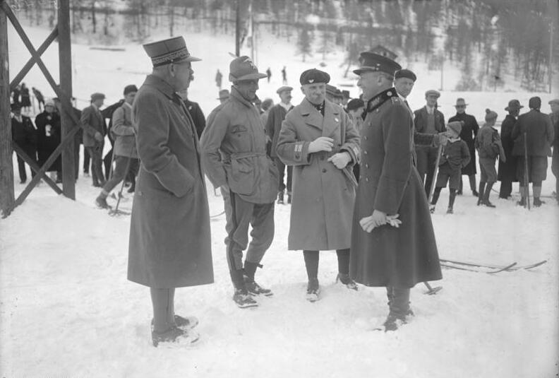 Die große Winter-Olympiade in St. Moritz! Erste Aufnahmen von unserem nach St. Moritz entsandten Sonder-Bild-Berichterstatter! Patrouillenlauf des Militärs, anläßlich der Olympiade in St. Moritz, bei welchem die norwegische Mannschaft siegreich blieb . Die deutsche Mannschaft belegte den 5. Platz. Internationale Offiziere als Schiedrichter am Start des Militär-Patrouillenlaufes, v.li.n.re.: der Vertreter Frankreichs, Italiens, der Schweiz und Polen.